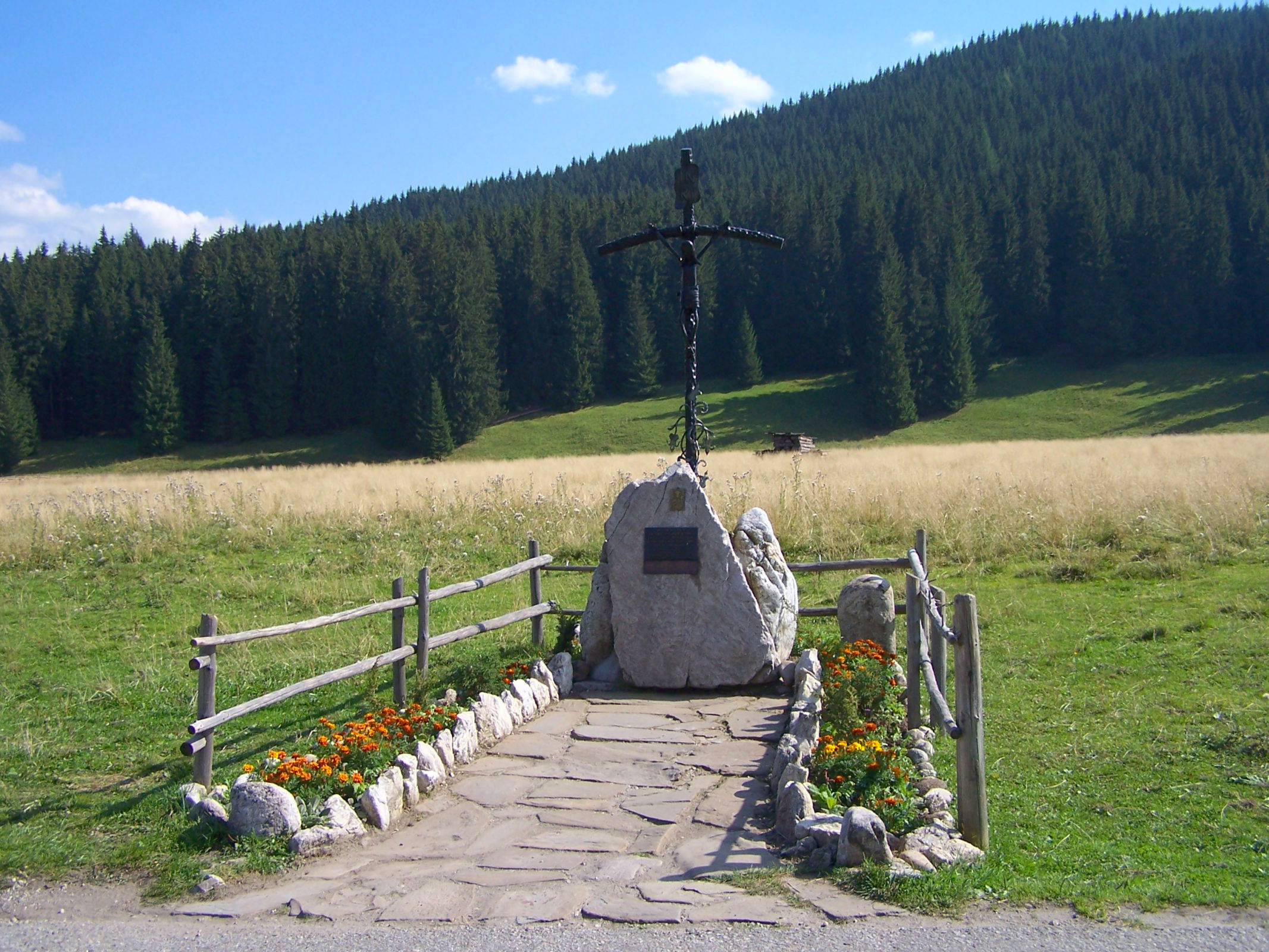 Siwa Polana (Dolina Chochołowska,Tatra Mountains)